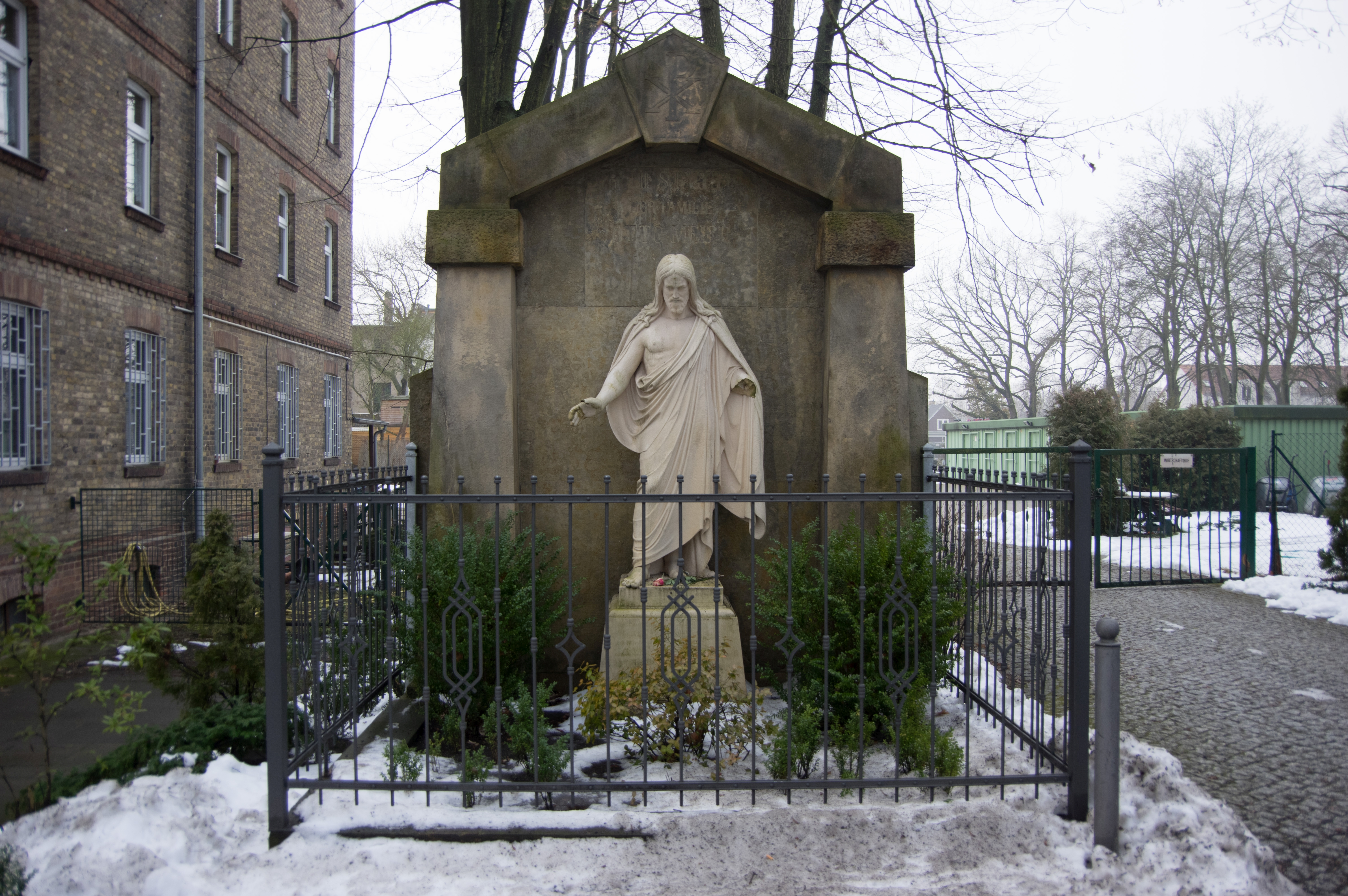 Berlin-Adlershof. Der Friedhof Adlershof befindet sich in dem Bezirk Treptow-Köpenick.